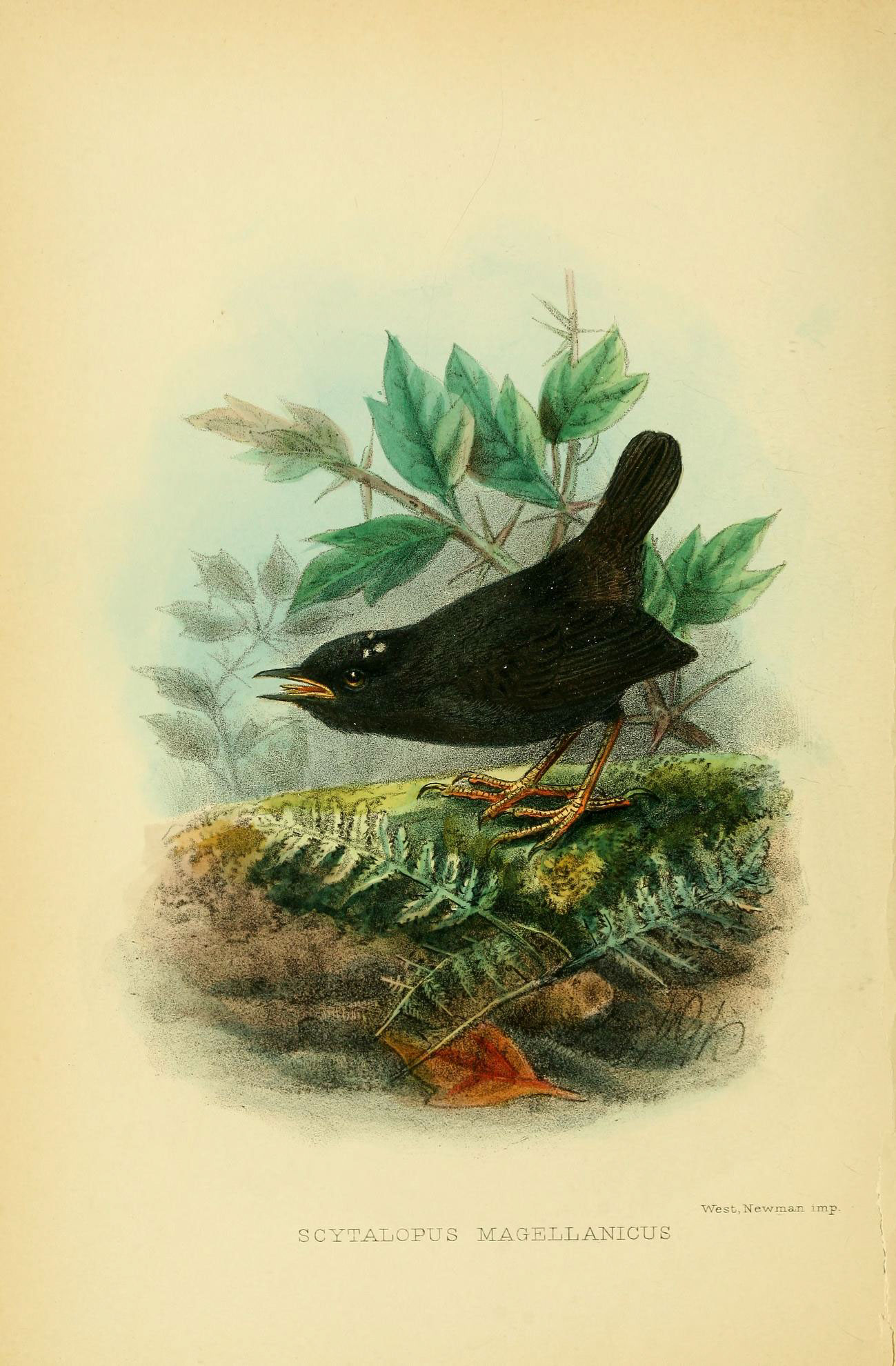 Magellanic tapaculo (Scytalopus magellanicus)